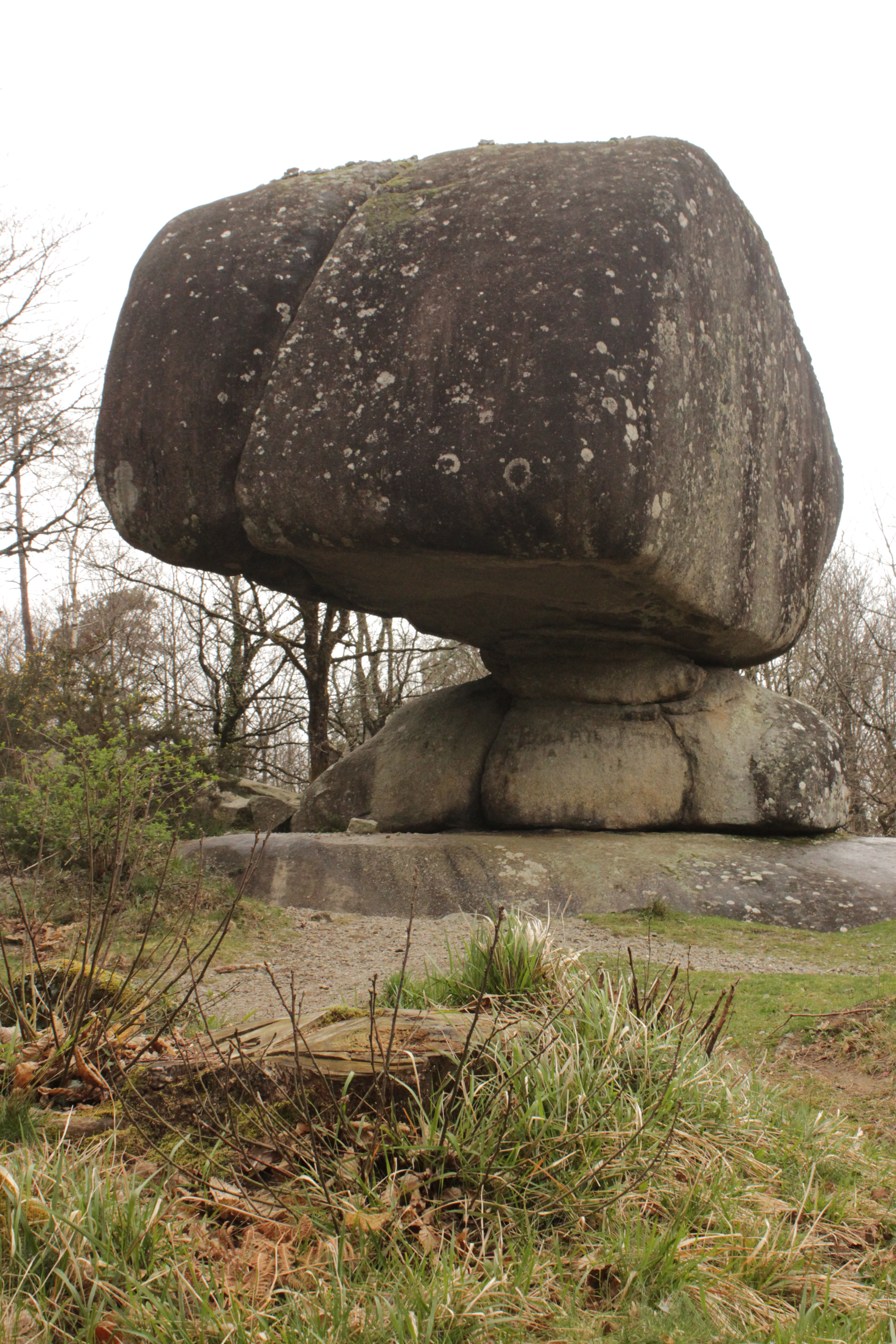 Le Peyro Clabado se trouvant au Sidobre